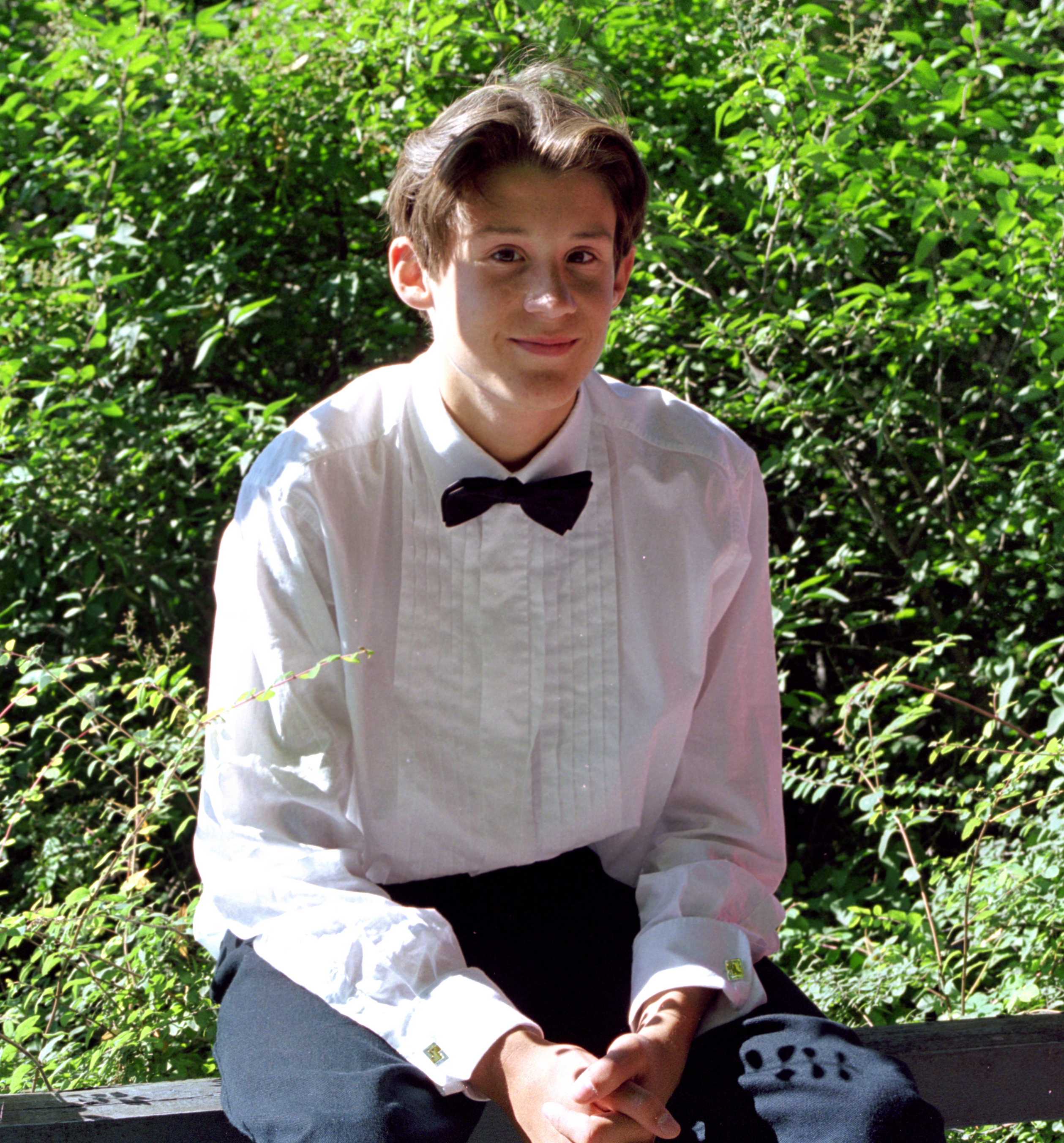 Carl-Robert Holmer-Kårell under inspelning av Eva & Adam - fyra födelsedagar och ett fiasko. Hagaparken 2000-08-26